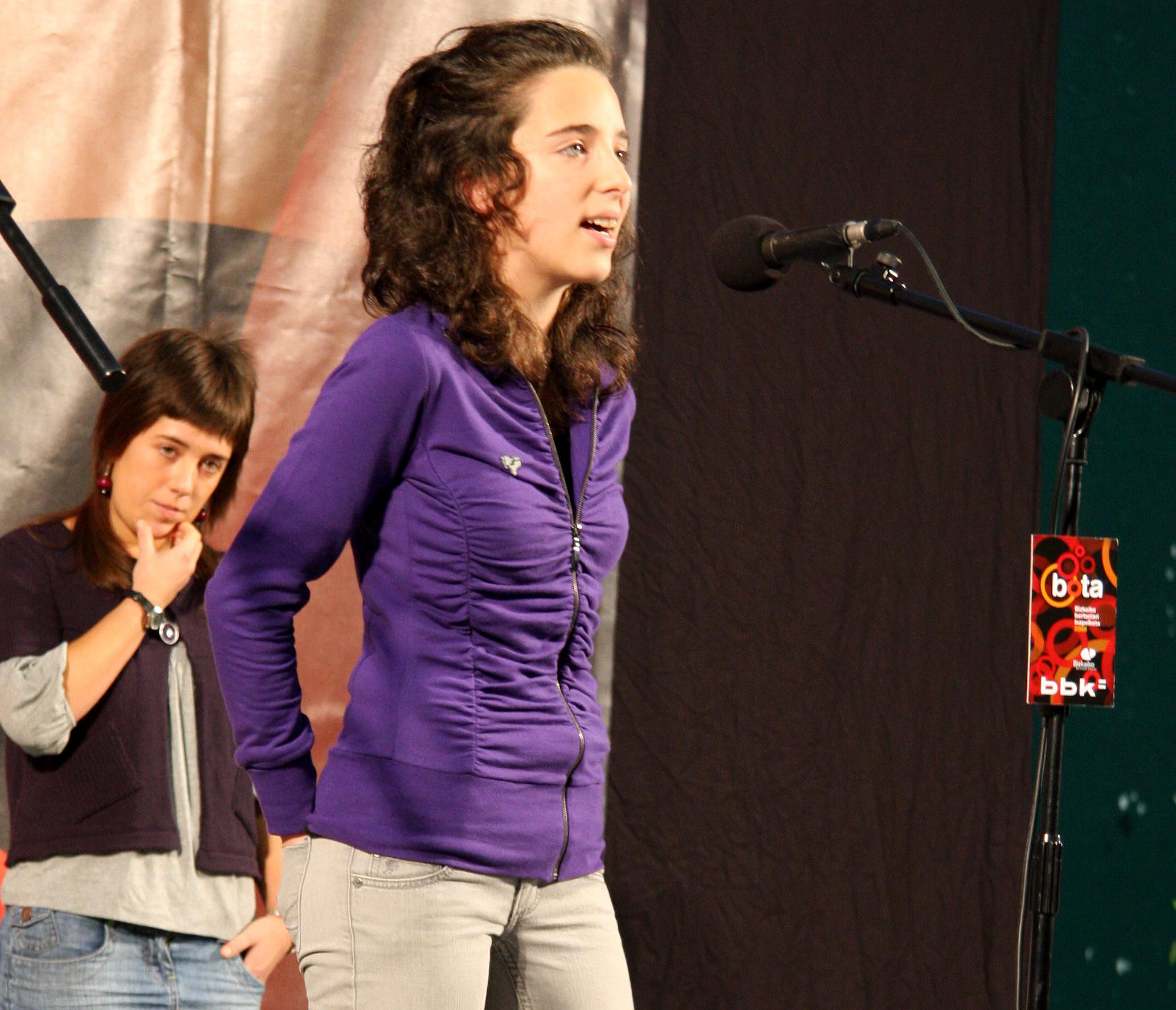 Miren Amuriza berriztarra 2008ko azaroaren 2an, Larrabetzuko frontoian jokatutako Bizkaiko Bertsolari Txapelketako laugarren kanporaketan.